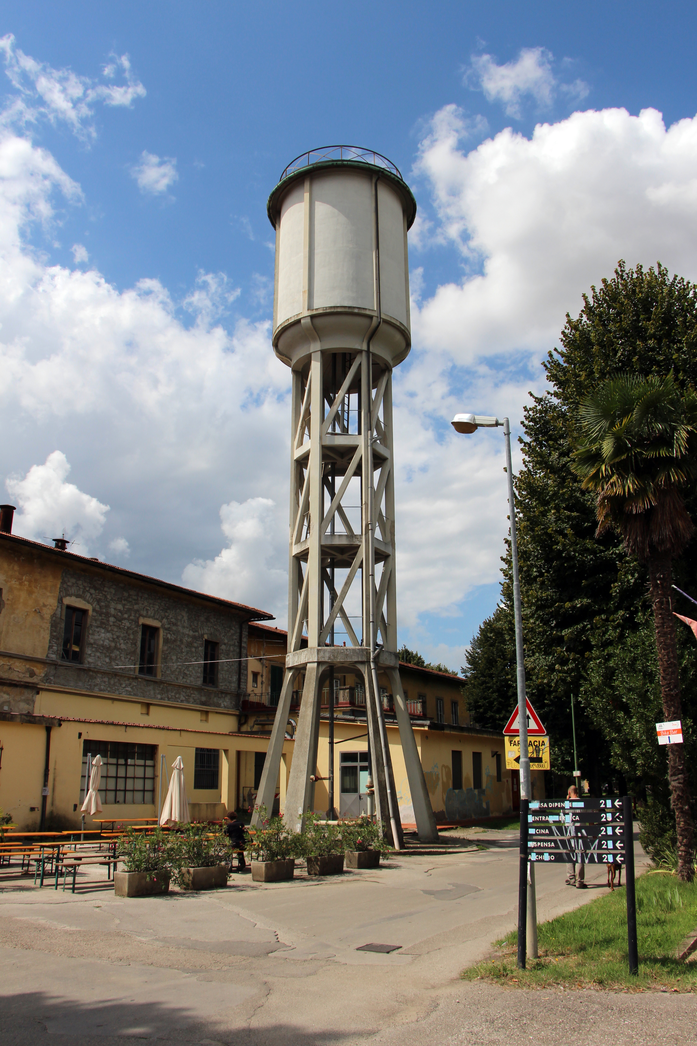 Firenze, vedi nome file